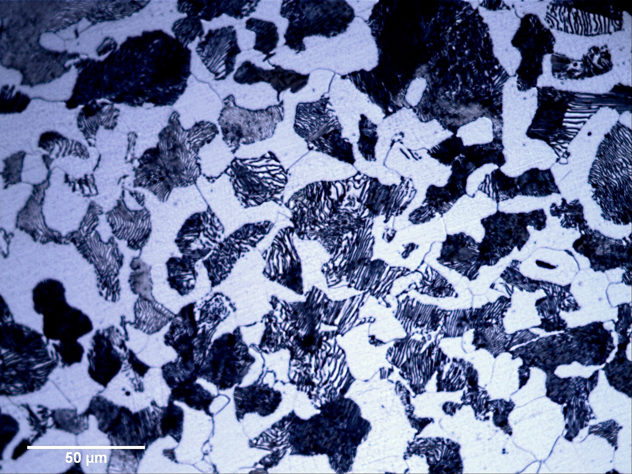 Ferritisch-Perlitisches Gefüge eine untereutektoiden Stahls mit 0,45 Ma-% Kohlenstoff (C45), 500-Fache Vergrößerung